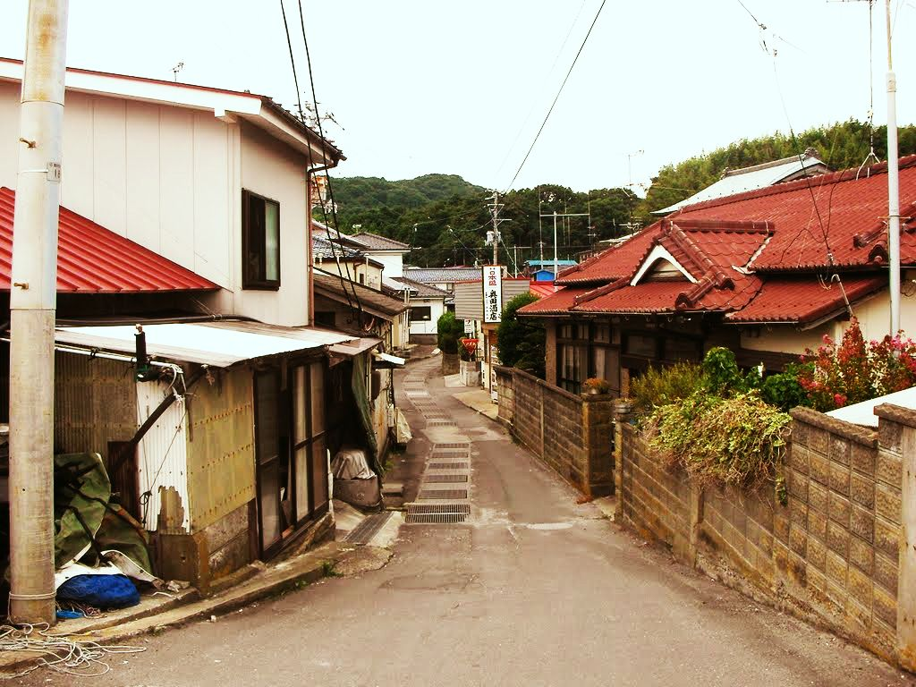 奥田太十郎の生家直近